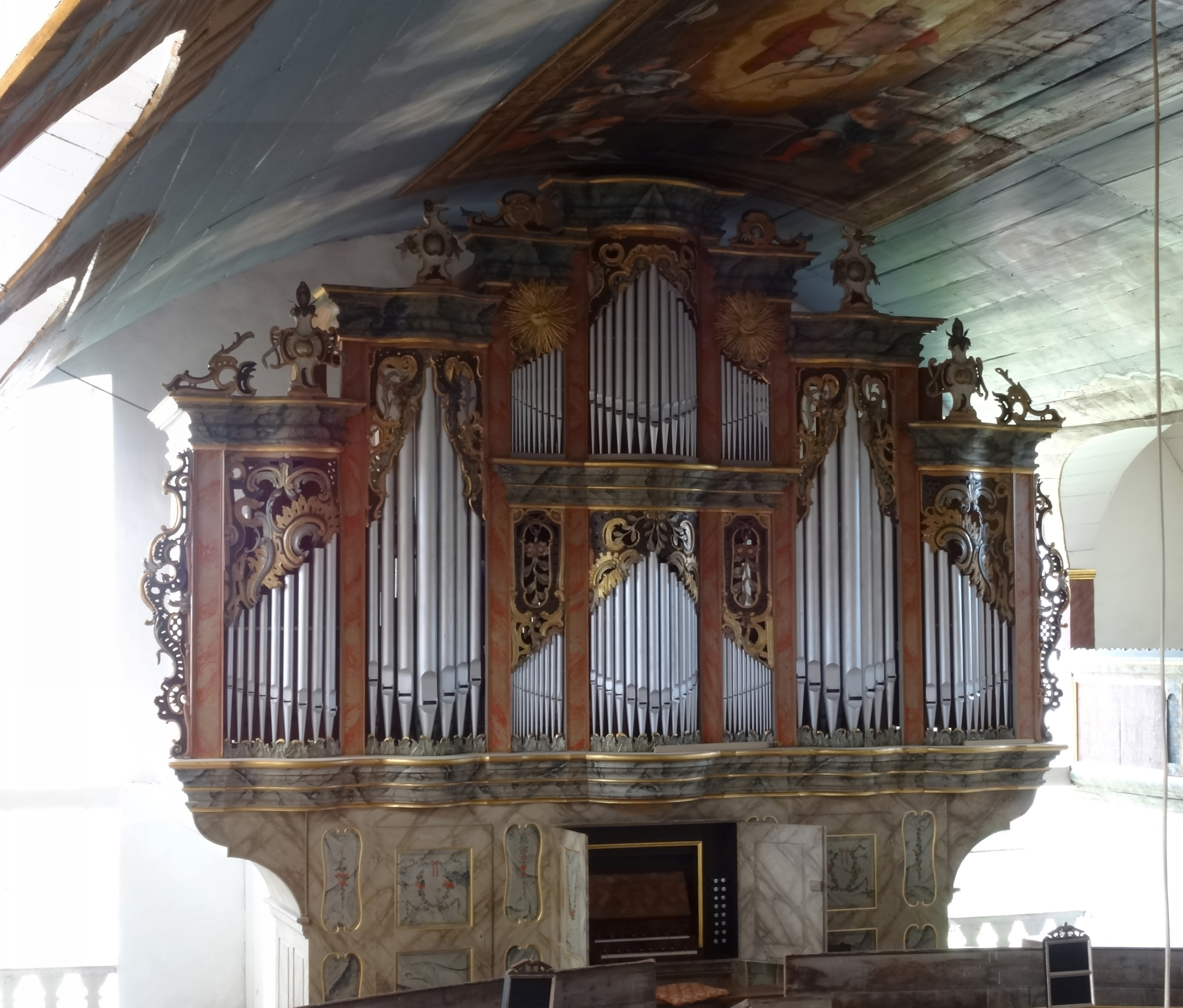 Dom der Rhön, die Orgel von Johann Michael Voit (Schweinfurt) mit 26 klingenden Stimmen und 3 Nebenregistern ist sein größtes Werk (1786)[1]